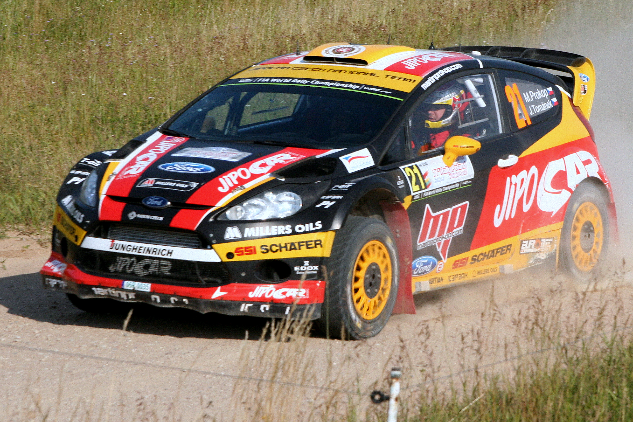 Martin Prokop podczas Rajdu Polski 2014, 11 OS